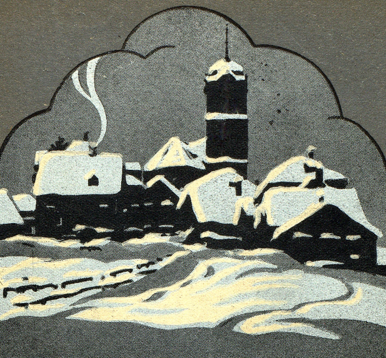 Cover der KVT-Mitteilungen Nr. 1 (Ausschnitt). Trogen im Winter